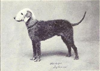 Bedlington Terrier from 1915